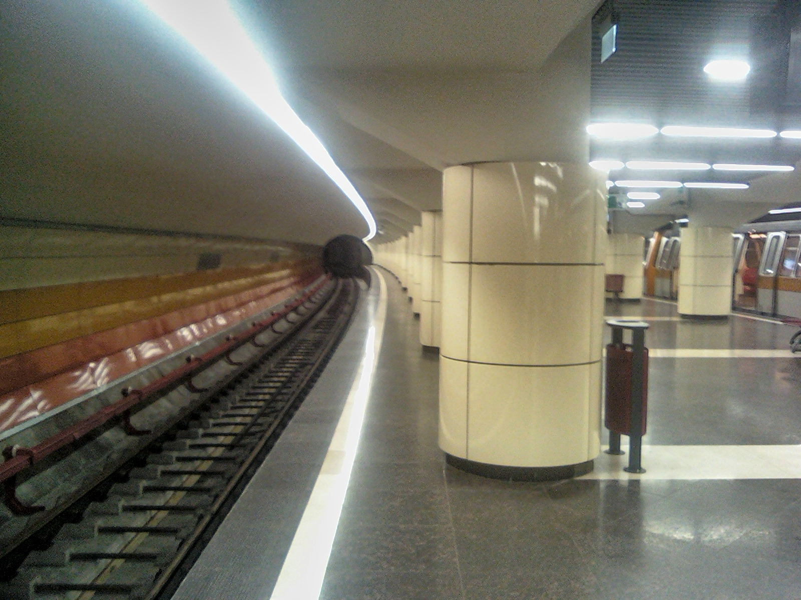 Stațoa de metrou Parc Bazilescu din București.